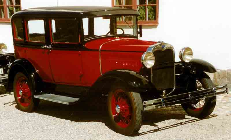 Ford Model A 4-Door Sedan 1930